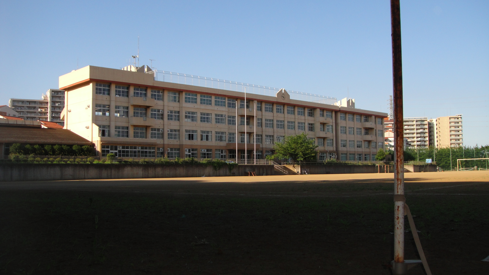 八王子市立宮上中学校校舎